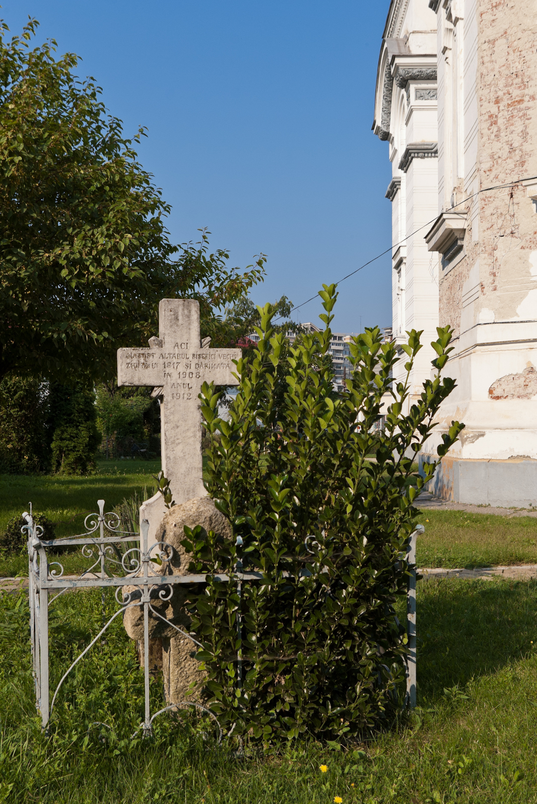 Fotografia prezinta o cruce de piatra in parcul bisericii "Sf. Vineri" din Pitesti. 03